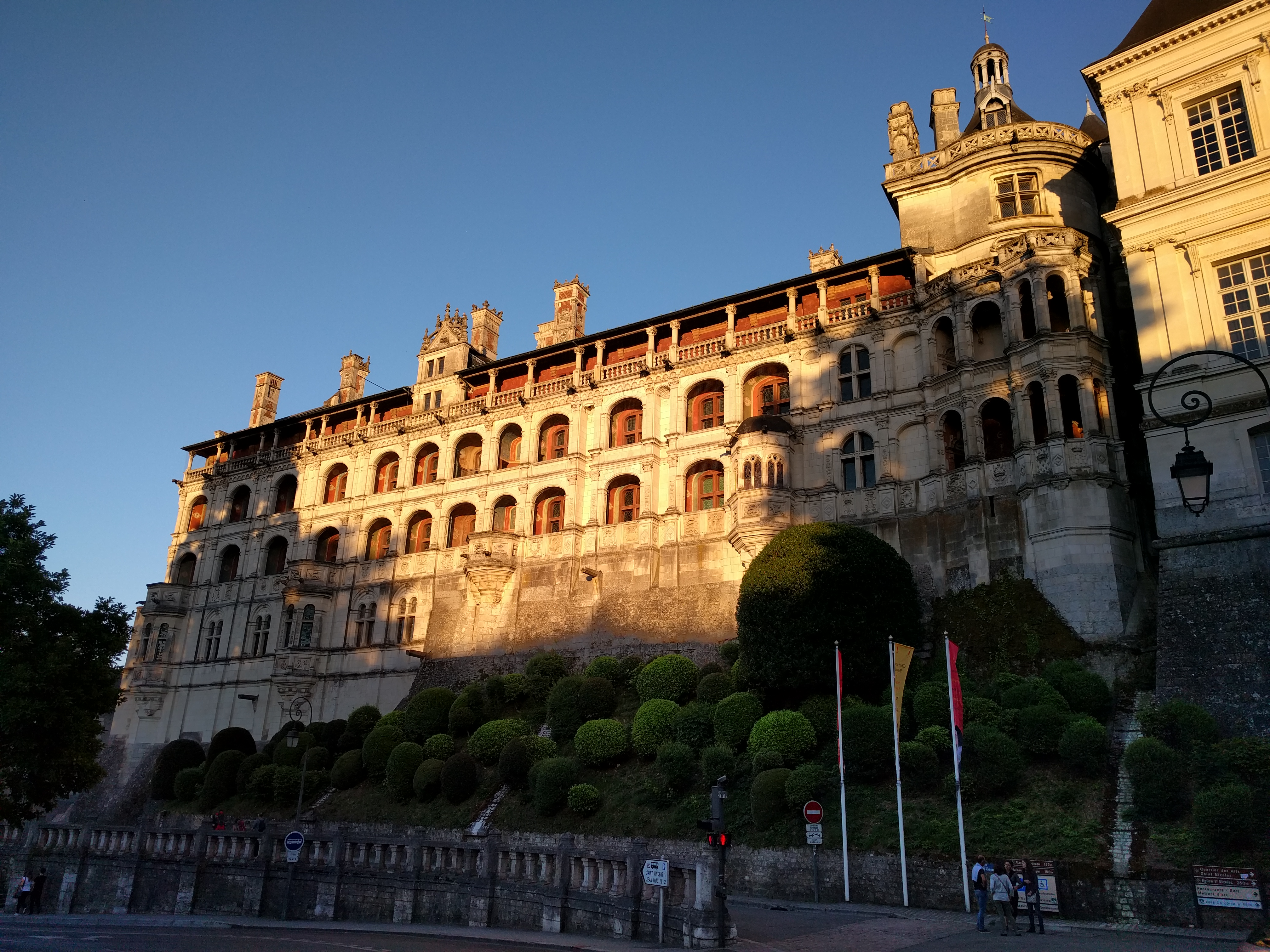 Fachada norte, también llamada Fachada de las logias, del castillo de Blois, Francia.